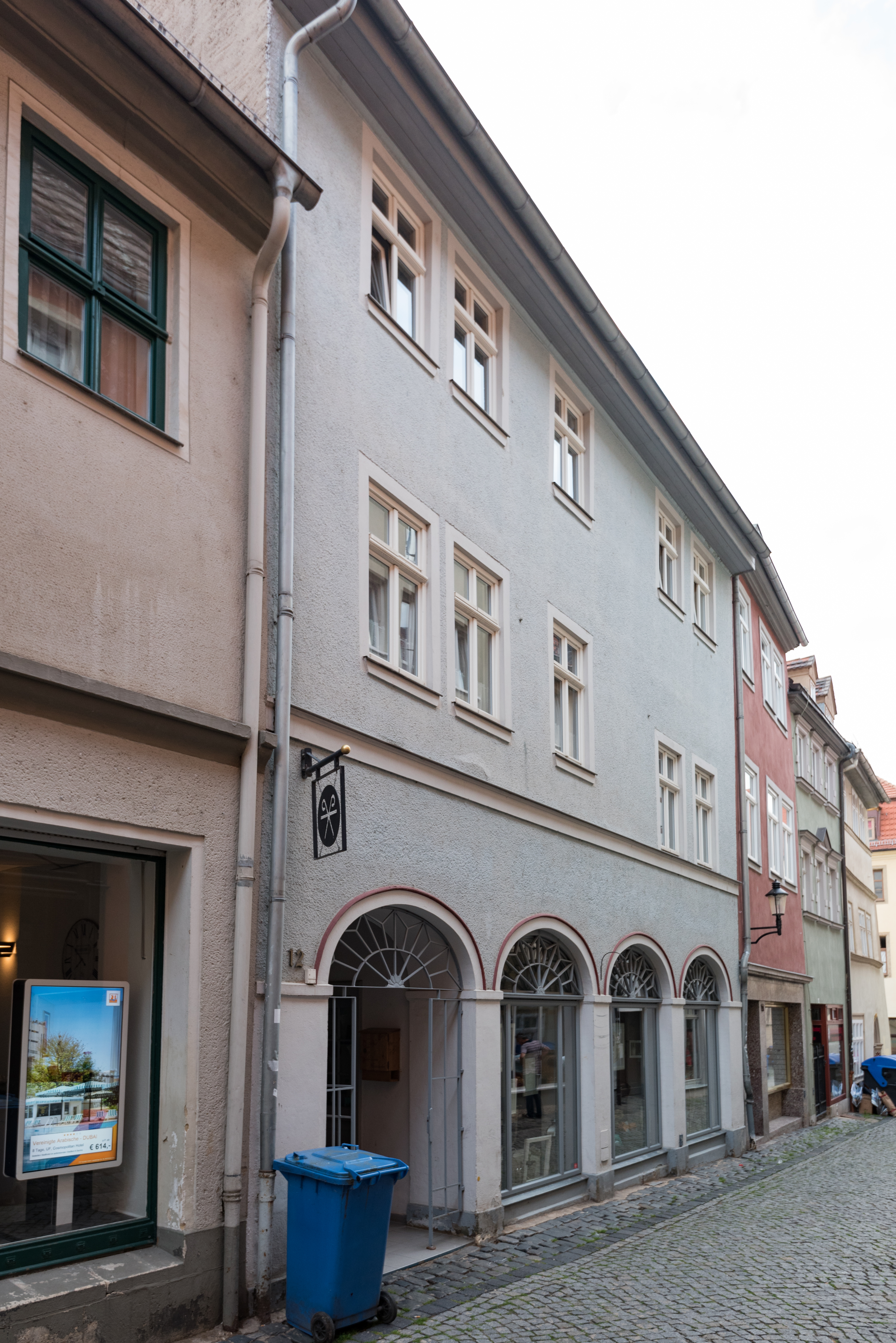 Naumburg (Saale), Engelgasse 12